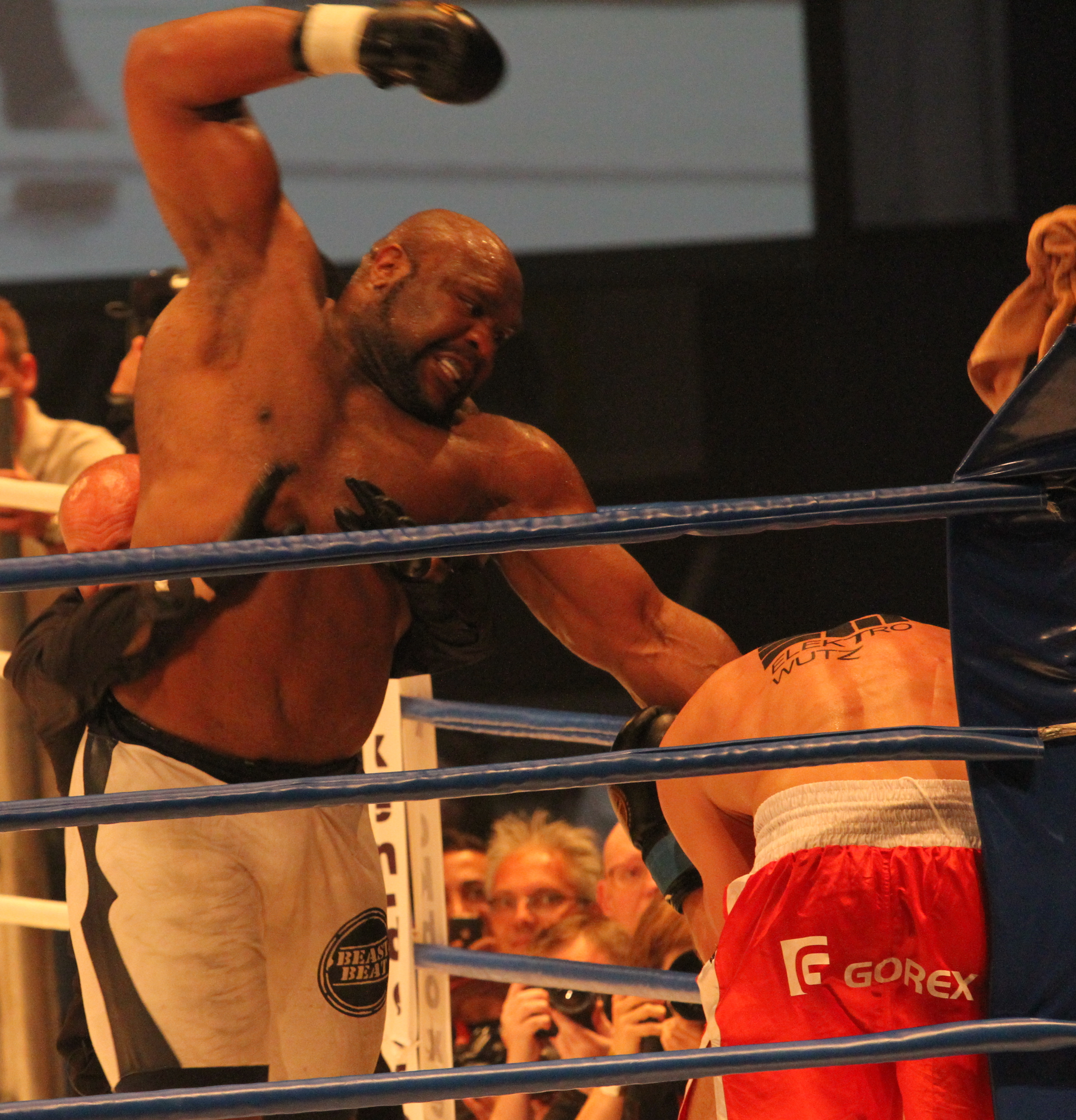 Bob Sapp, Thaiboxer